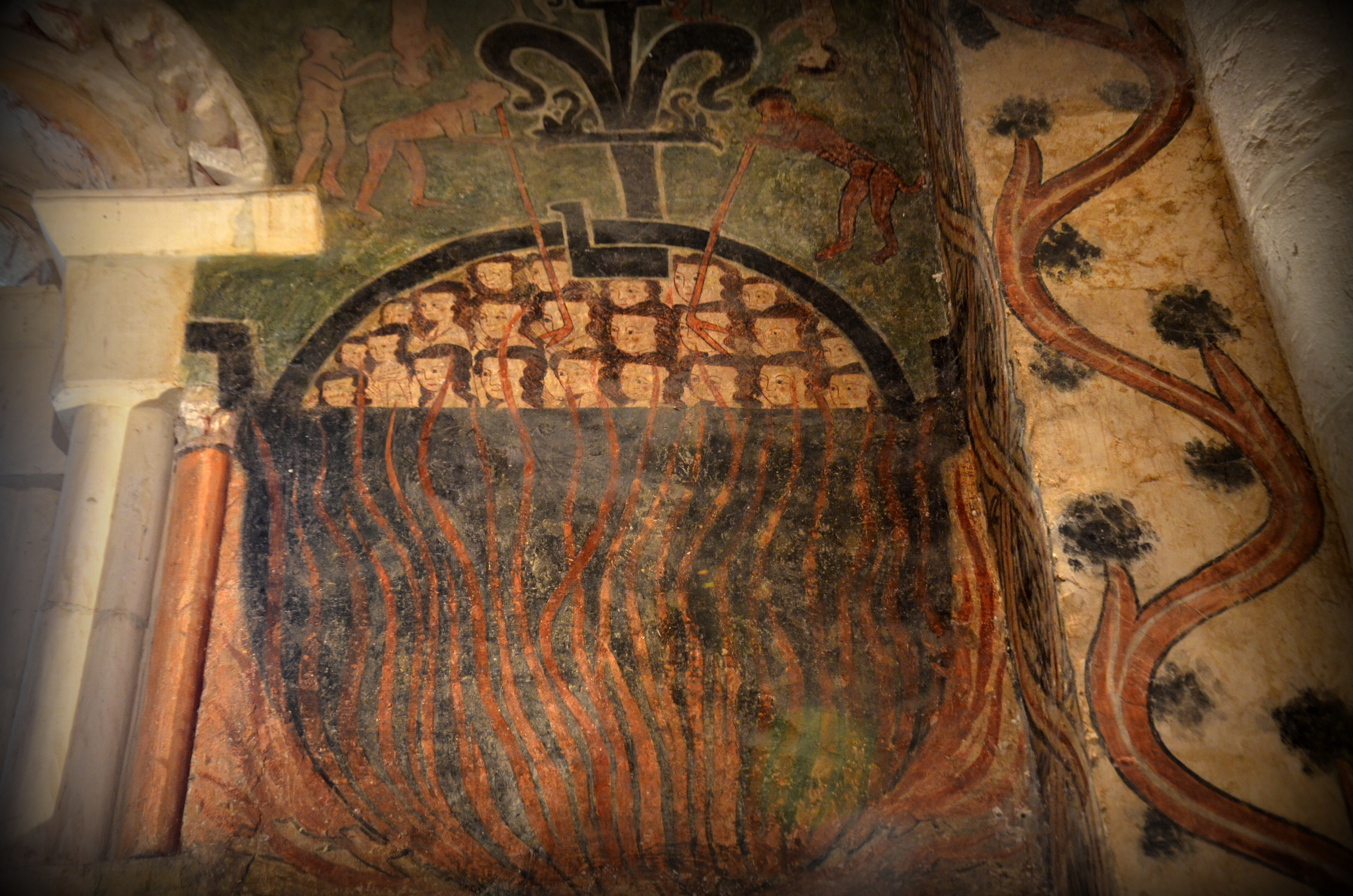 San Martin Tourskoaren eliza erromanikoa (Gazeo, Iruraitz-Gauna, Araba)